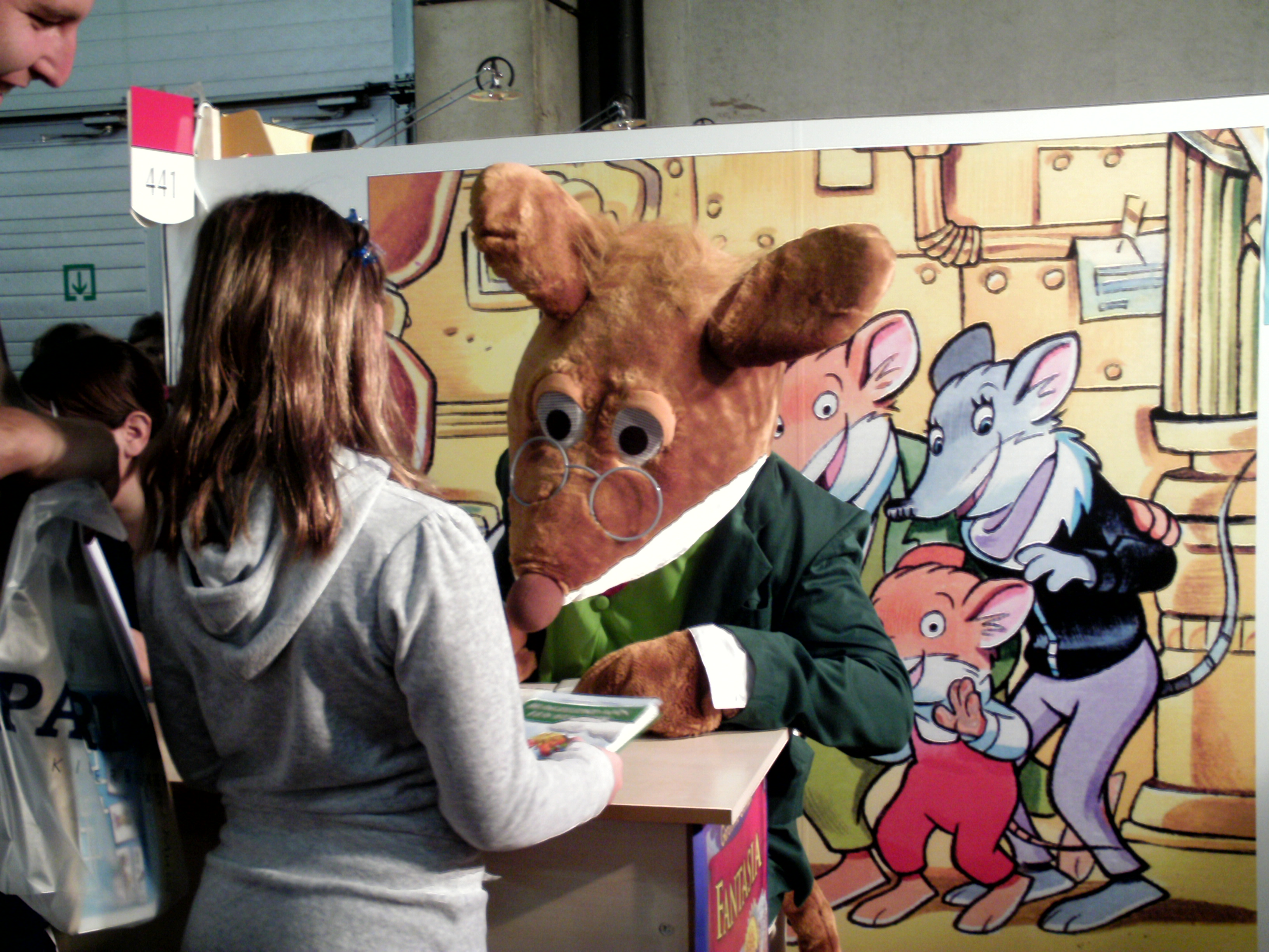 Geronimo Stilton - Boekenbeurs Antwerpen 10-11-2008